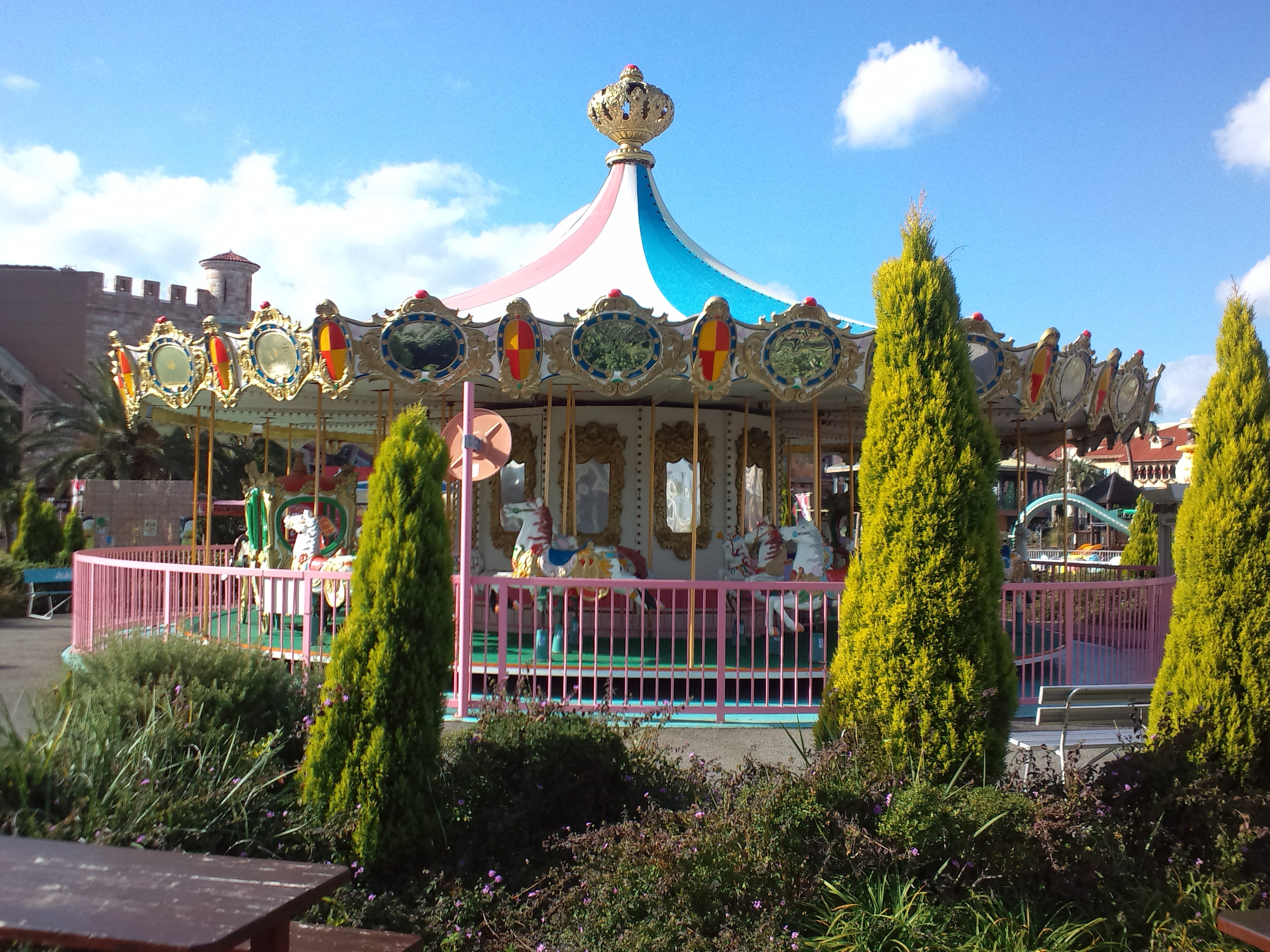 ポルトヨーロッパ メリーゴランド